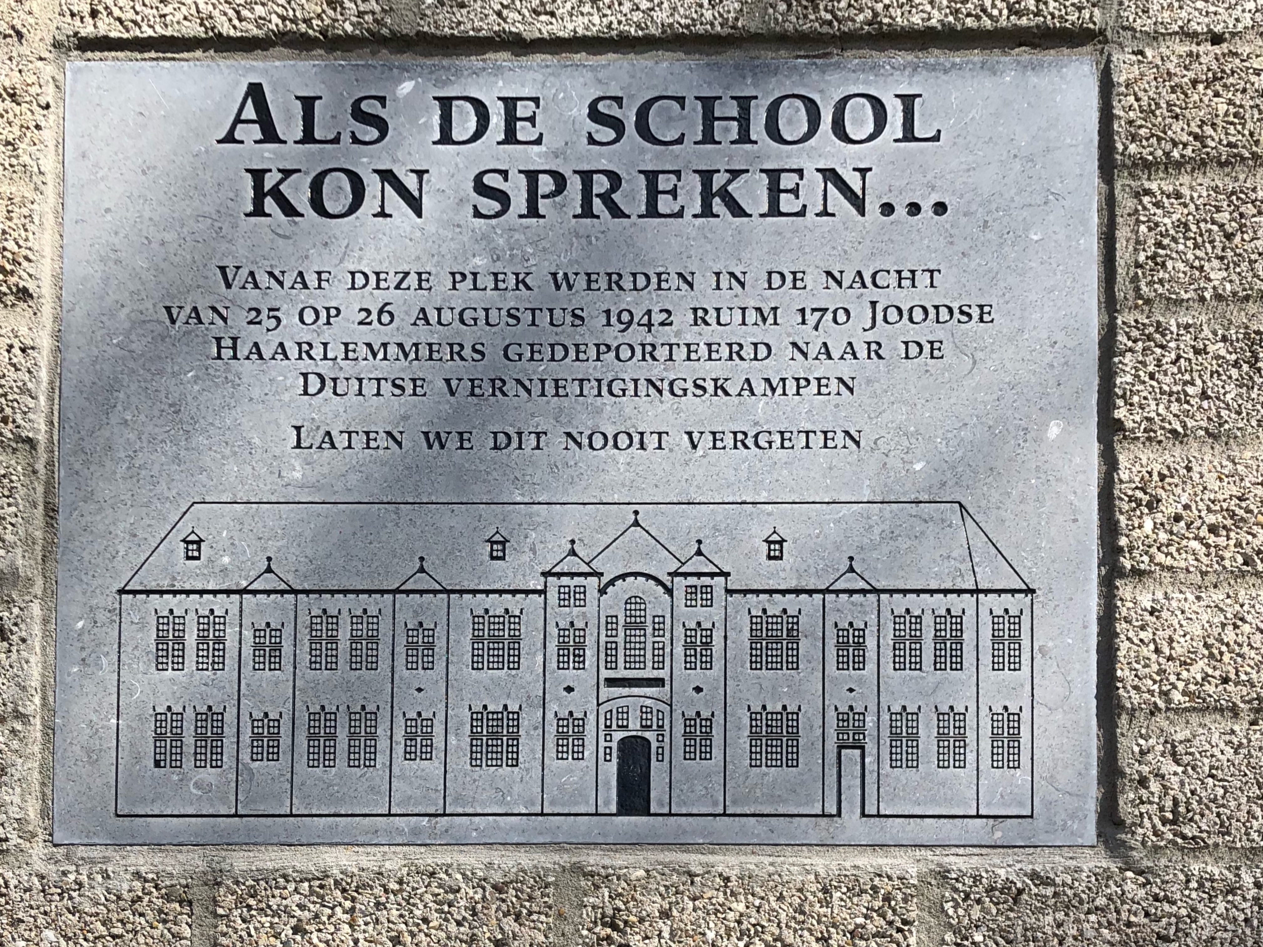 'ALS DE SCHOOL KON SPREKEN... VANAF DEZE PLEK WERDEN IN DE NACHT VAN 25 OP 26 AUGUSTUS 1942 RUIM 170 JOODSE HAARLEMMERS GEDEPORTEERD NAAR DE DUITSE VERNIETIGINGSKAMPEN. LATEN WE DIT NOOIT VERGETEN.'